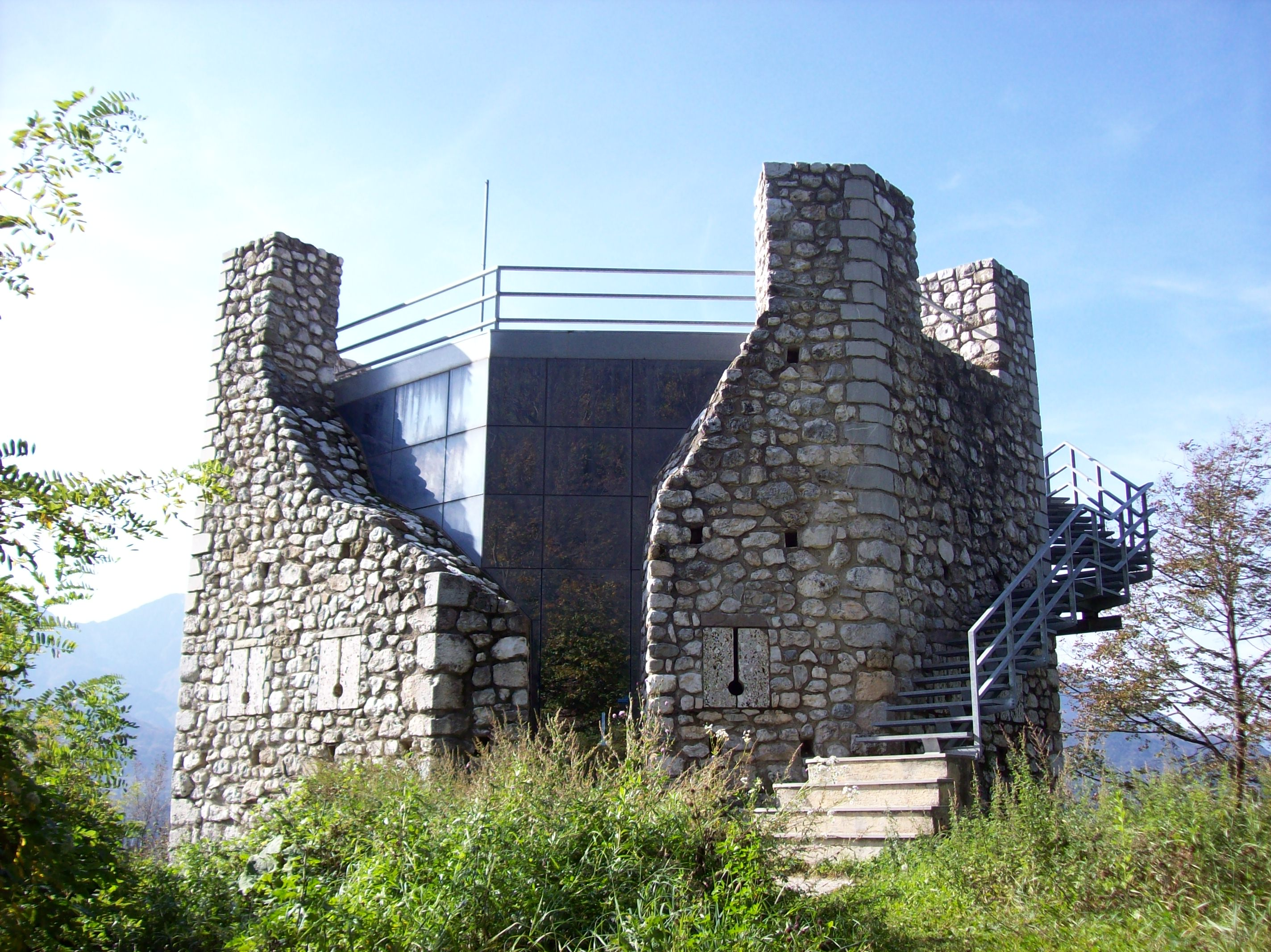 Tolmezzo (UD), la Torre Picotta